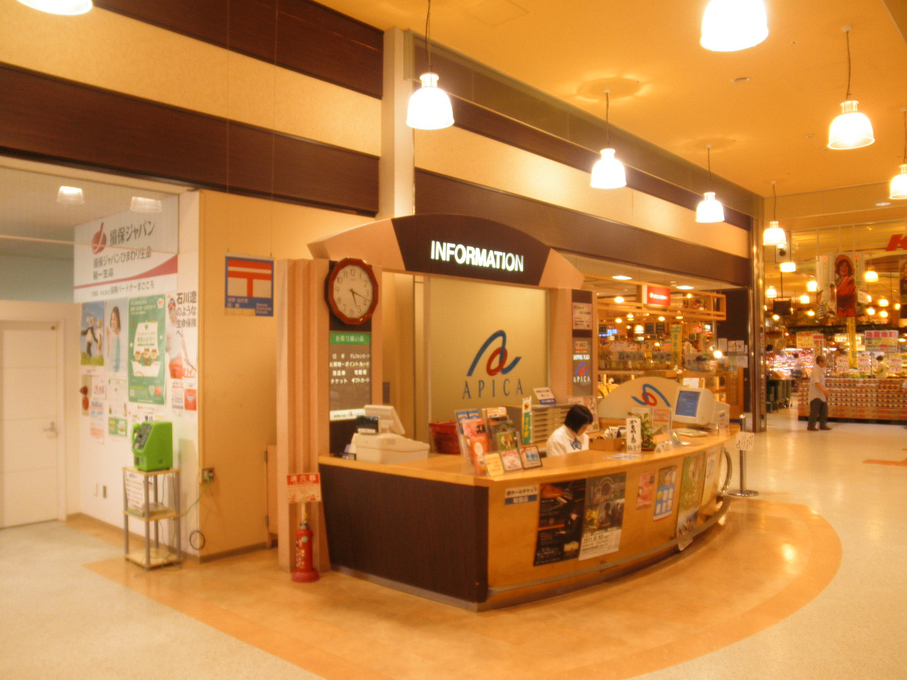 ショッピングプラザアピカ インフォメーション